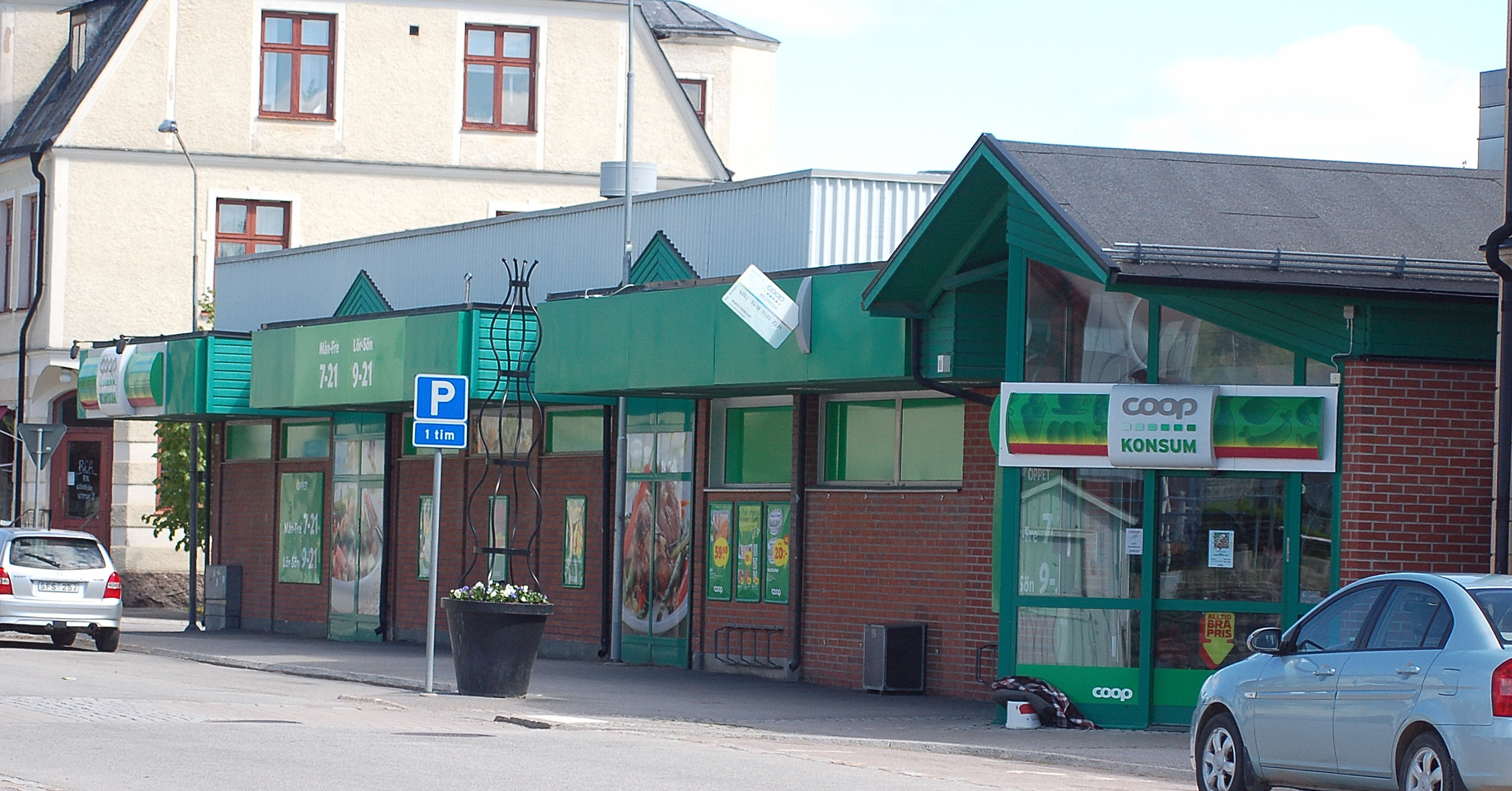 Coop Konsum i Fjugesta.